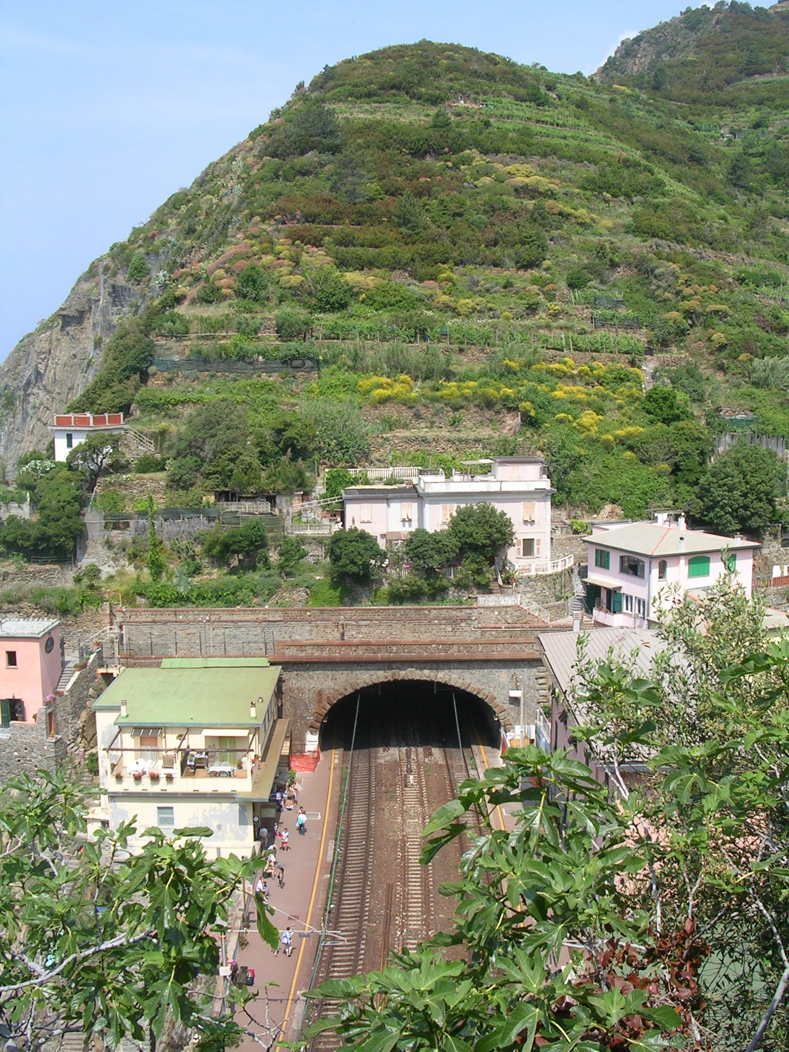 RiomaggioreRio Maggiore